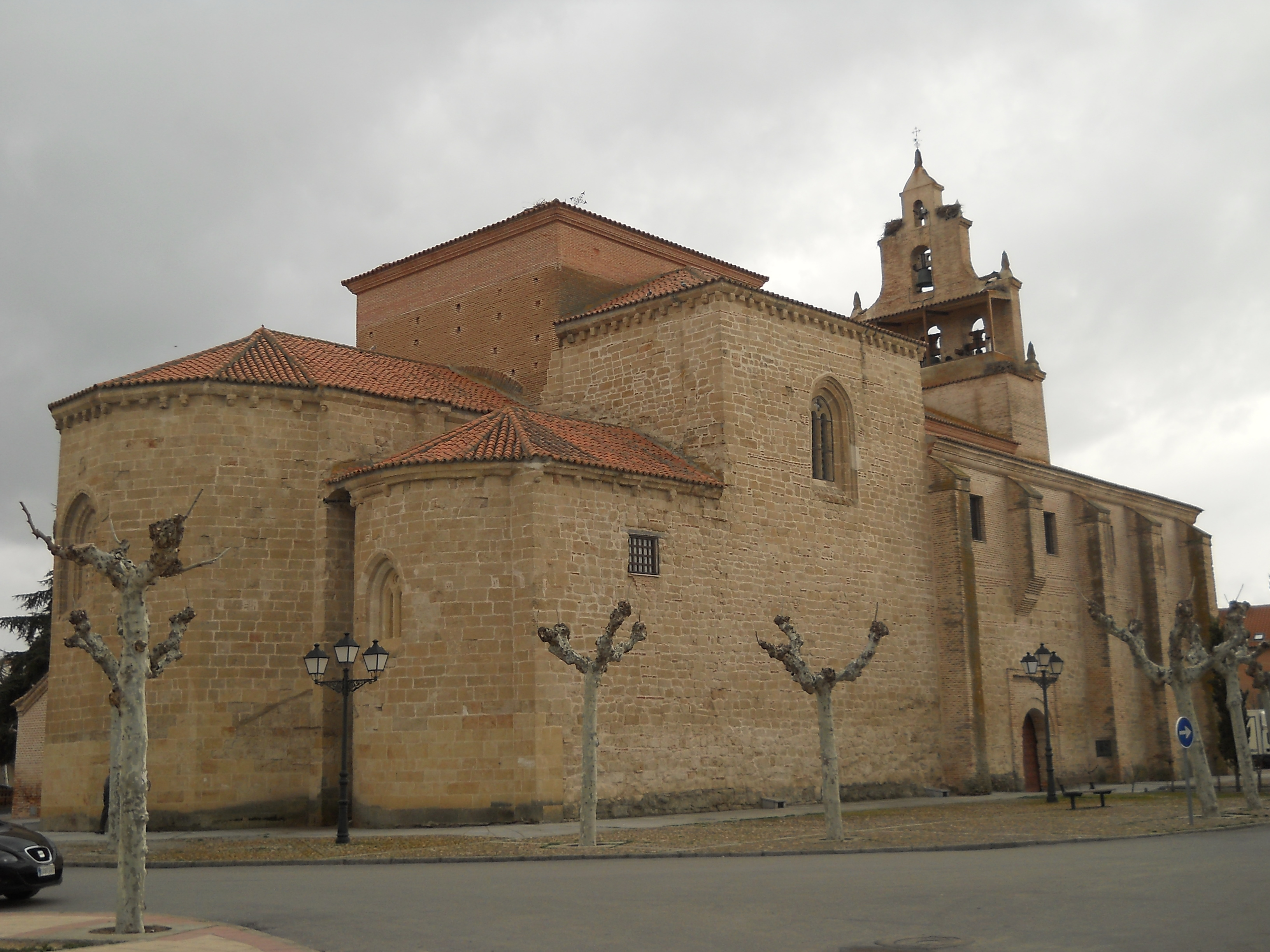 Iglesia de Santa María del Castillo, Cantalapiedra, Salamanca, España